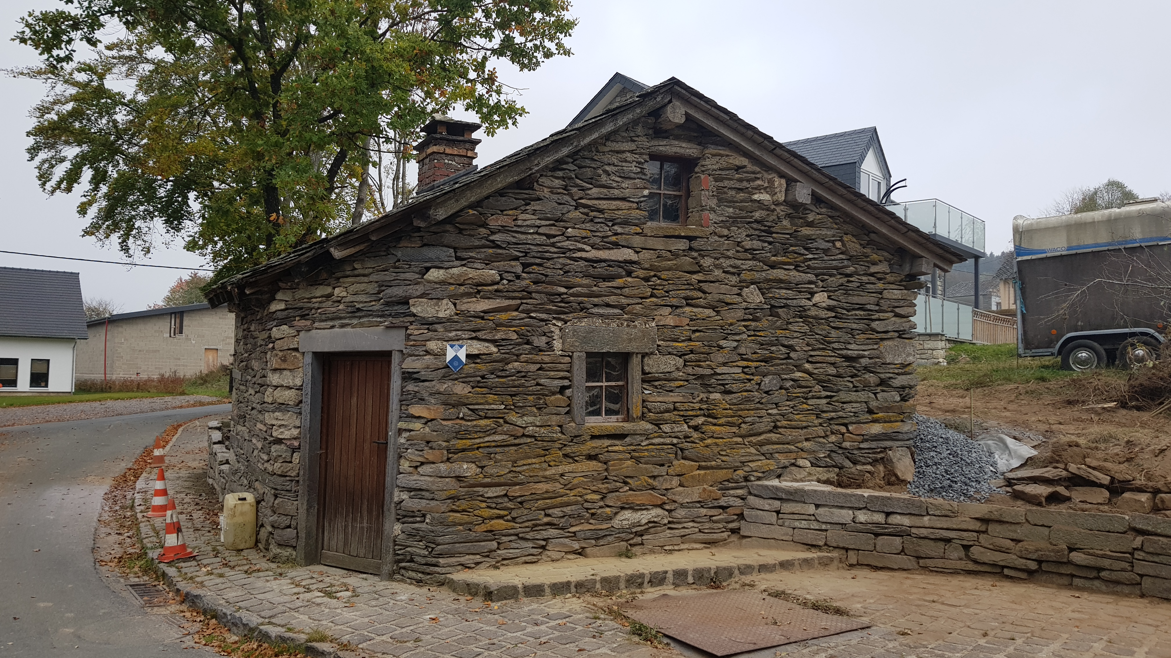 Backhaus, Recht, Sankt Vith, Belgien This photo of immovable heritage has been taken in the Walloon Region